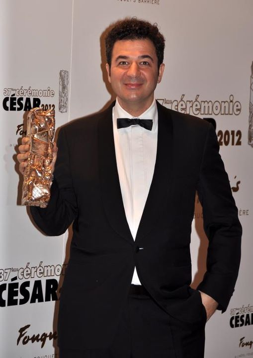 Ludovic Bource à la cérémonie des César